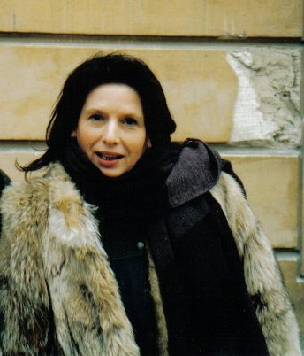 Marzena Trybała (ur. 16 listopada 1950 roku w Krakowie) - polska aktorka